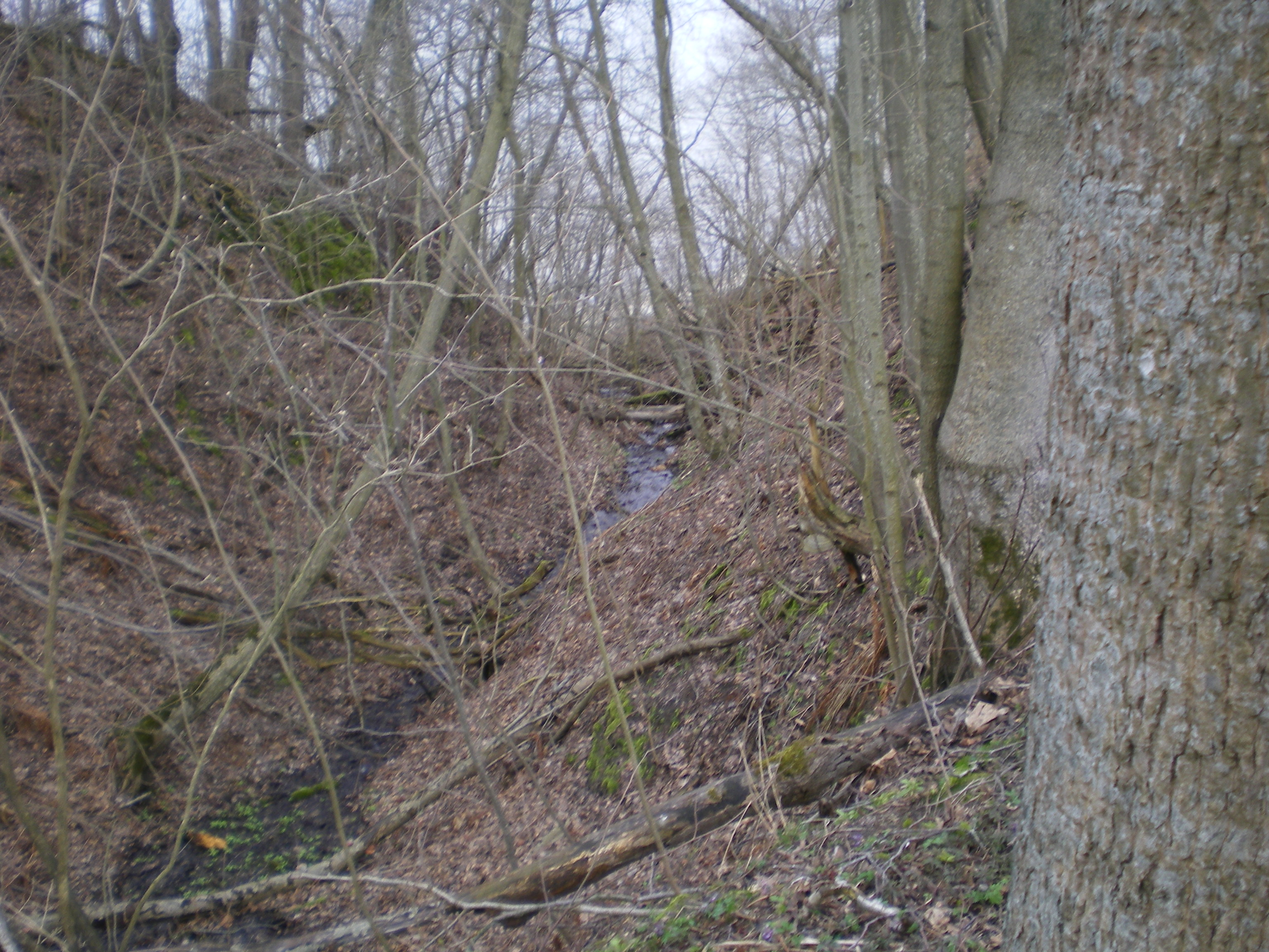 Voka jõgi